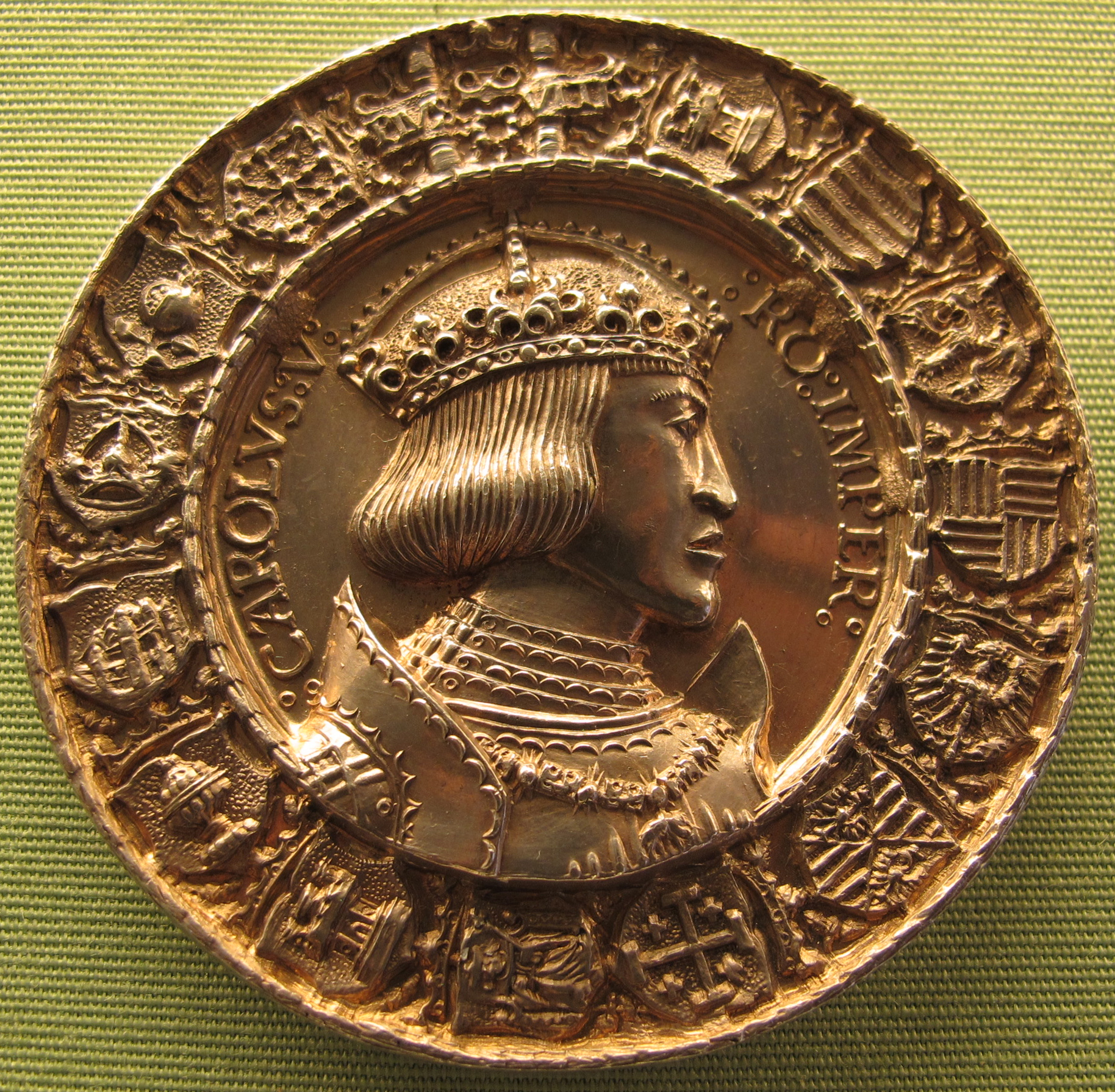 Albrecht dürer (disegno) e hans krafft, carlo V, 1520-1521